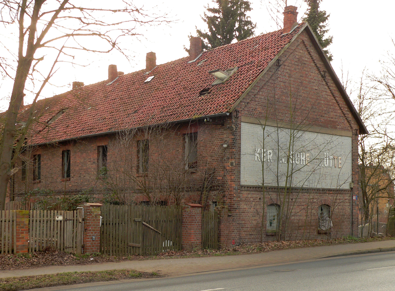 Keramische Hütte in Sehnde